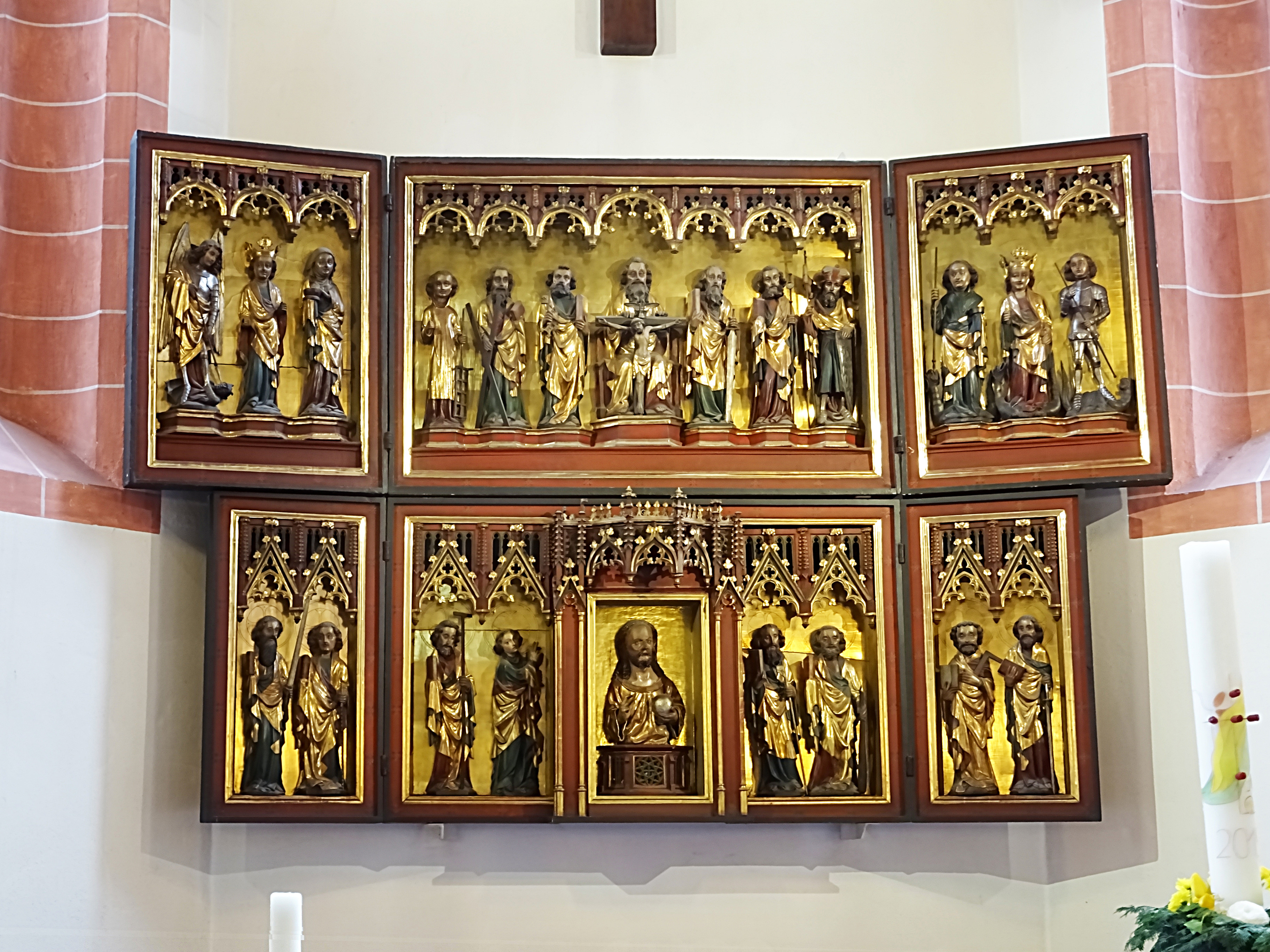 gotischer Flügelaltar der Lorenzkirche (Erfurt)